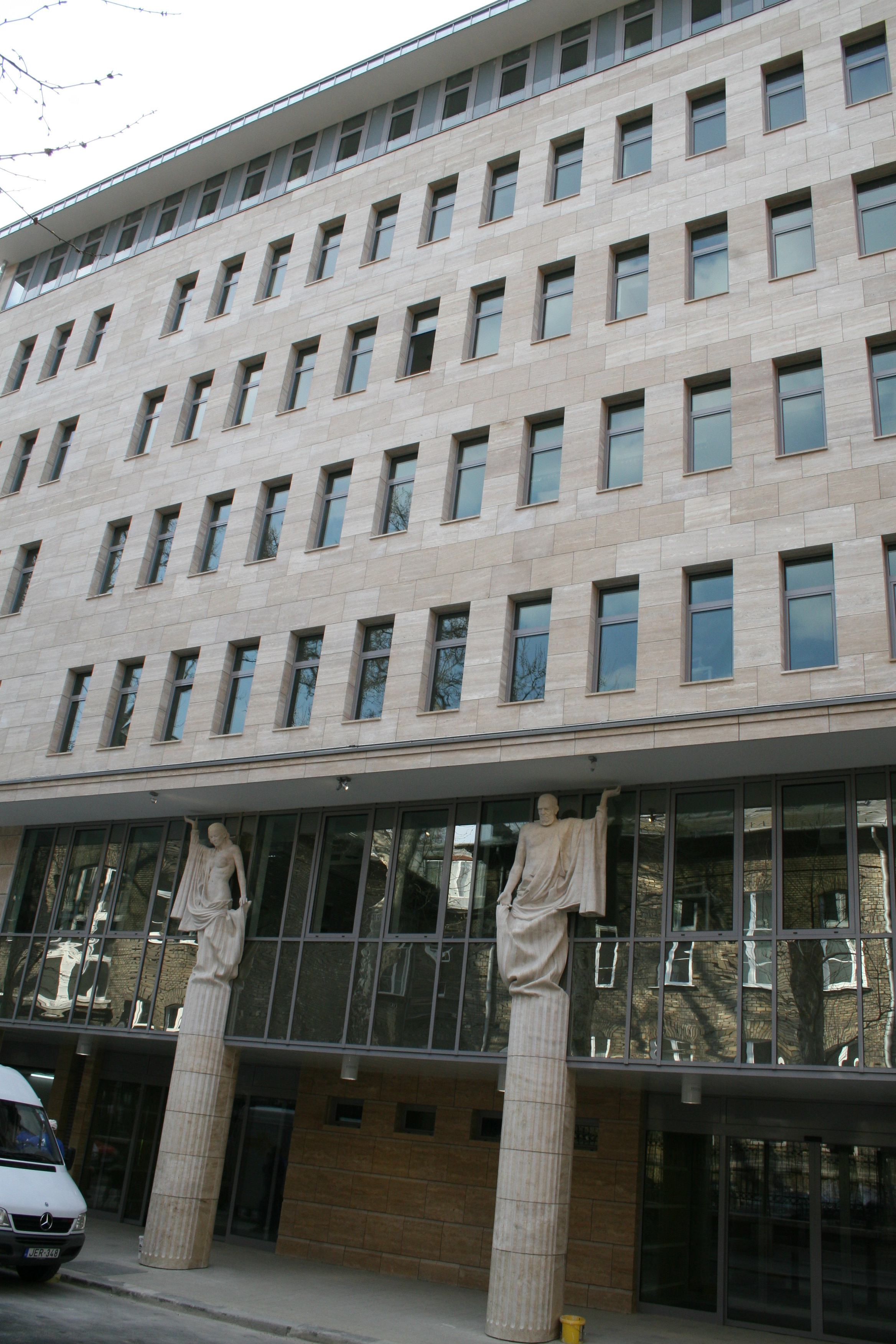 Fogorvostudományi Oktatási Centrum. - Cím: Budapest, Szentkirályi u. 47